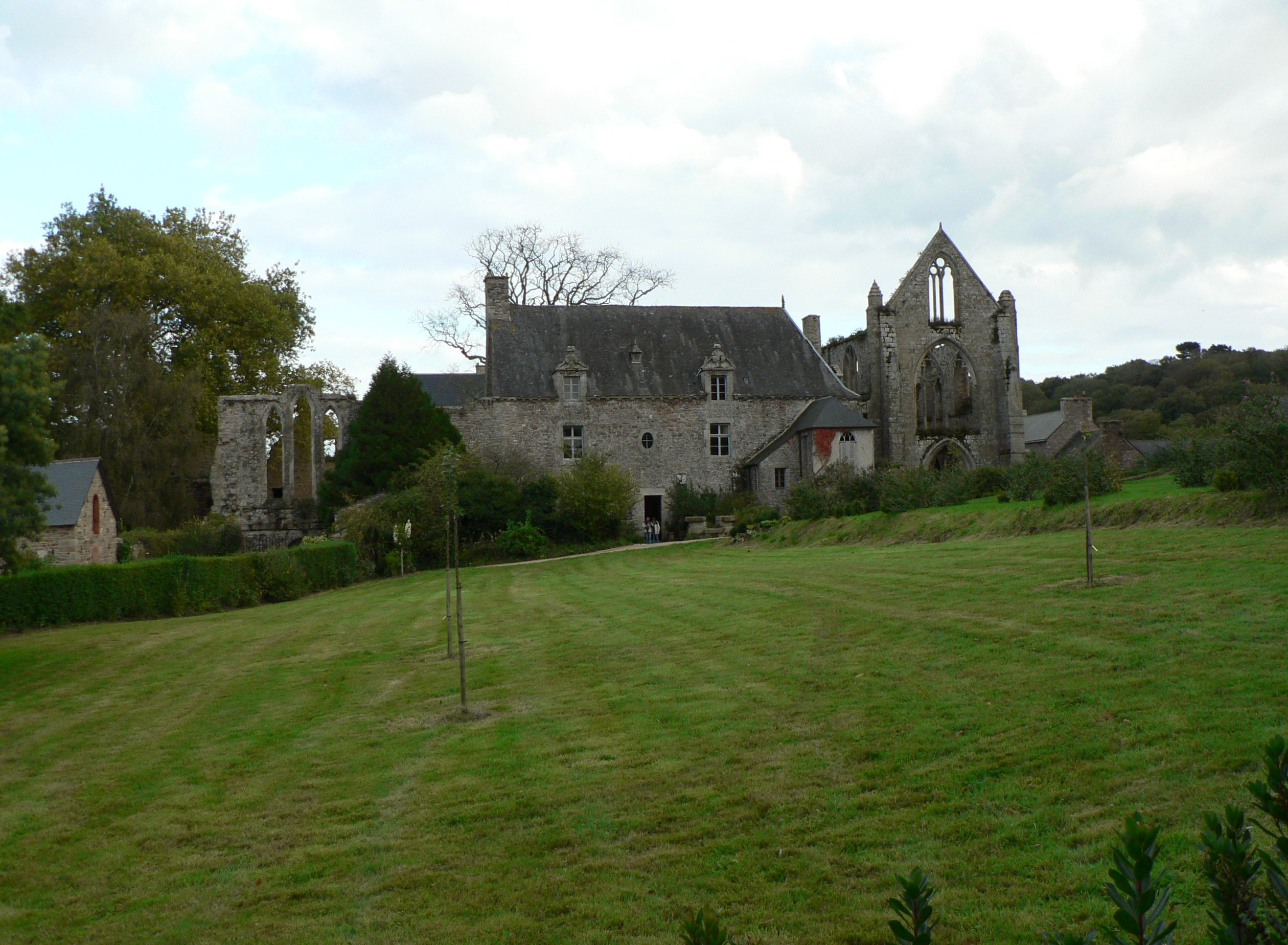 Abbaye de Beauport, Paimpol, Bretagne (France)